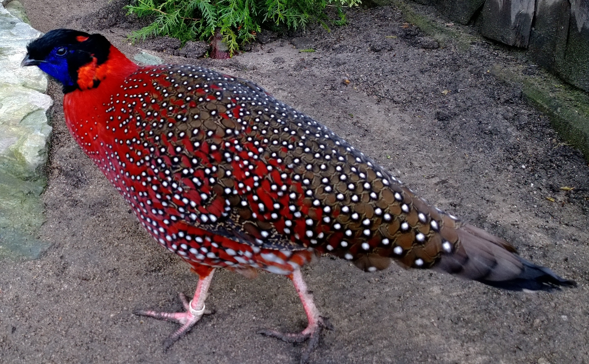 Satyr Tragopan im Opel-Zoo Kronberg nahe Frankfurt am Main